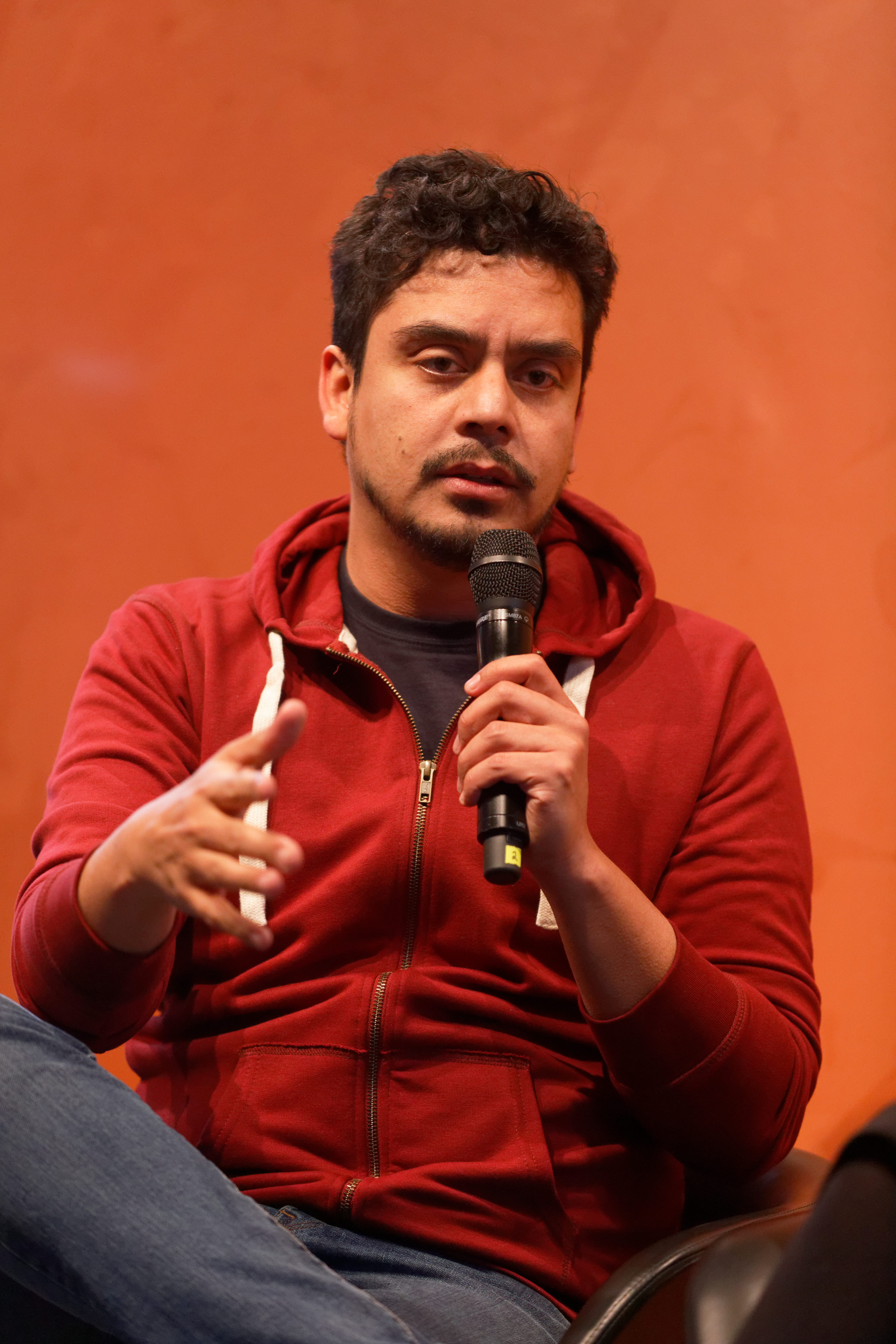 Jayro Bustamante beim Talk der GWFF-Jury in der Audi Lounge zur Berlinale 2017